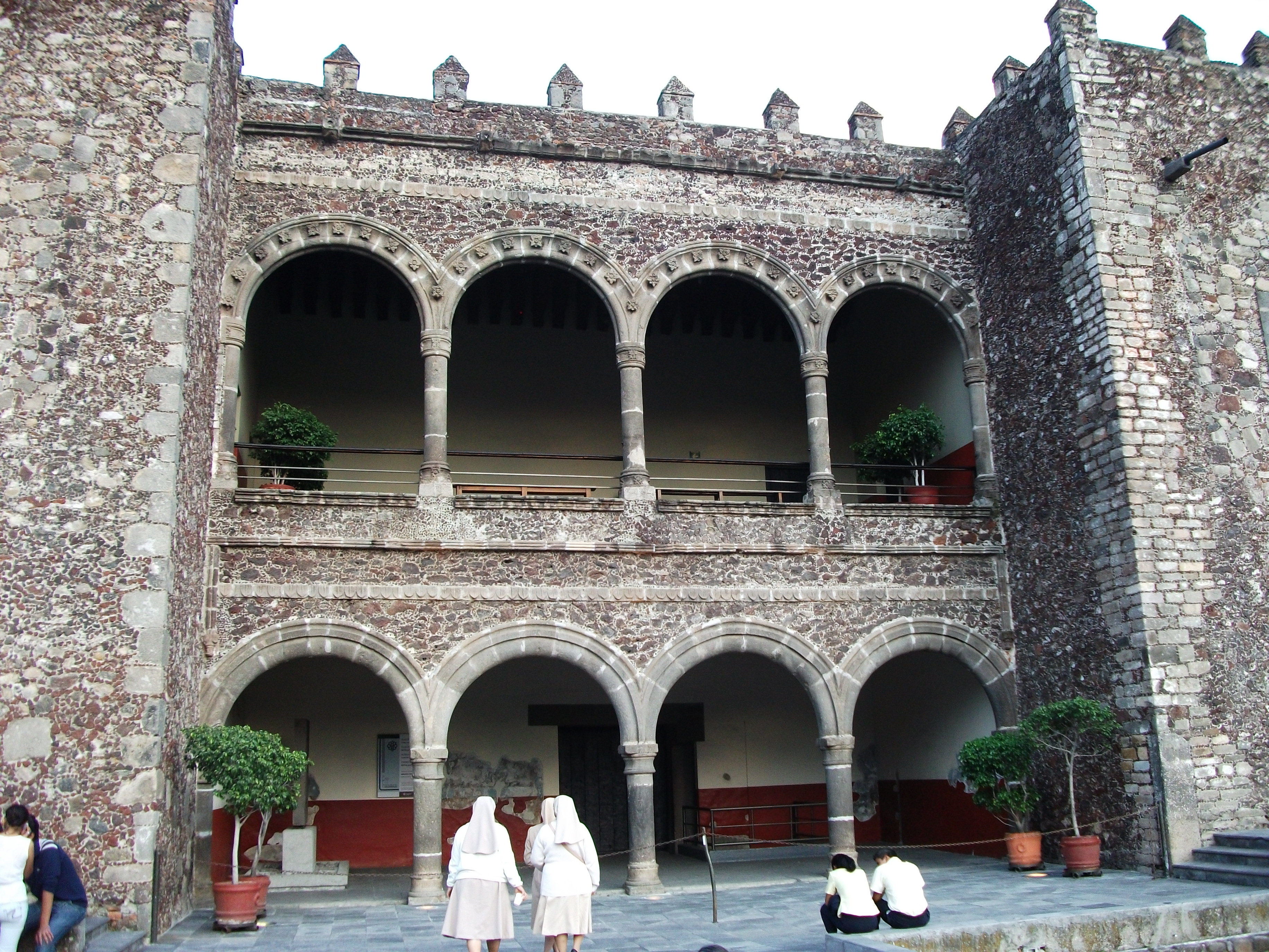 Fachada del Palacio de Cortés en Cuernavaca, Morelos, México.